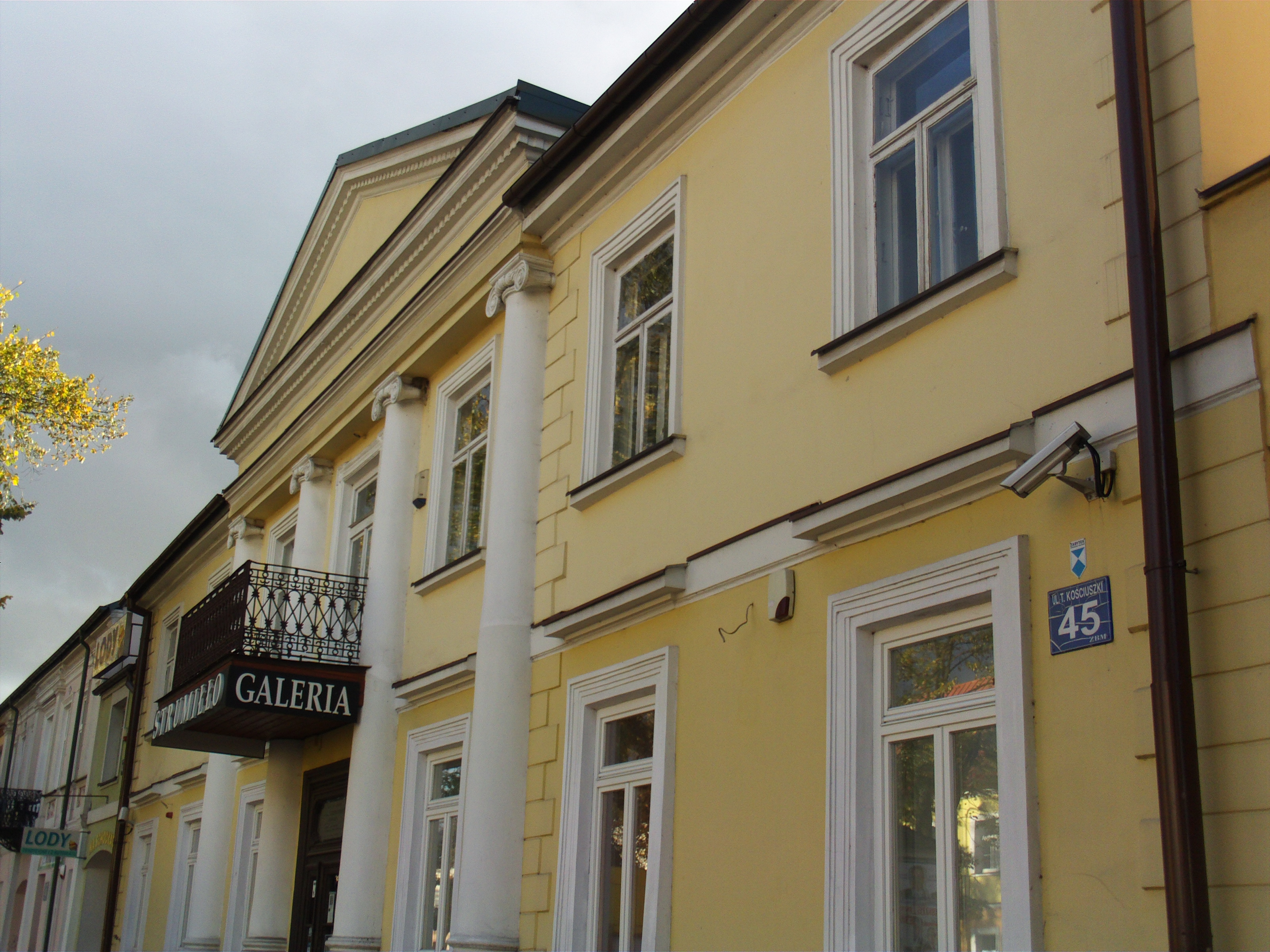 Suwałki ul. Kościuszki 45